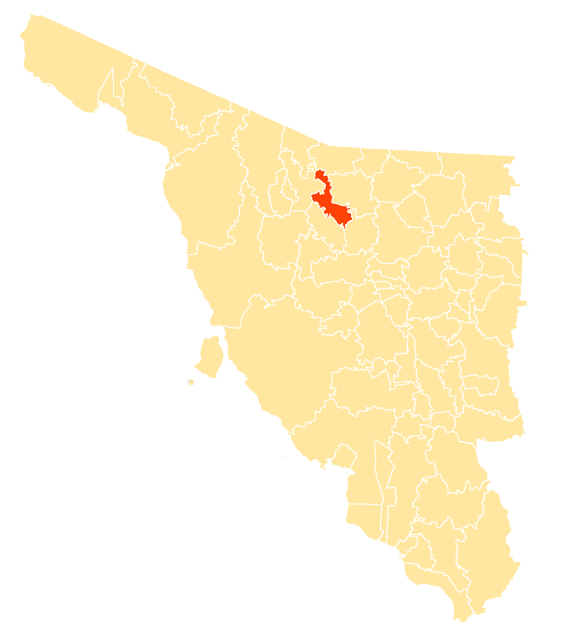 Municipio dentro de Sonora, México.